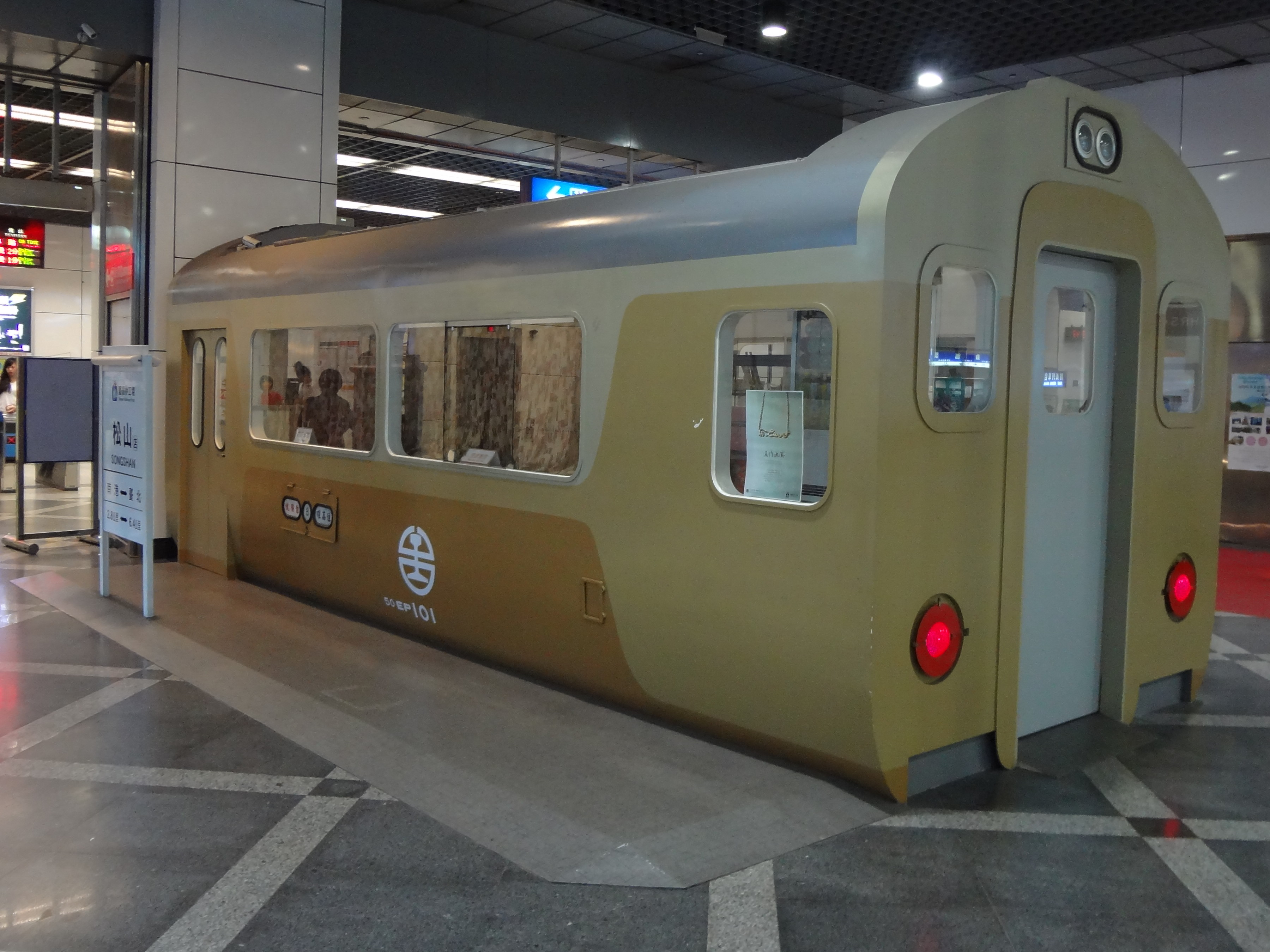 臺鐵夢工場松山店，位於松山車站地下1樓西邊剪票口，外觀為EMU100型電聯車駕駛電源動力車50EP101造型。